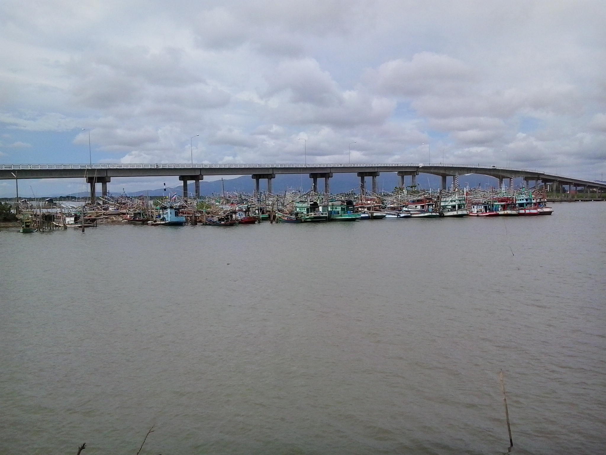 สะพานตากสินมหาราช แหลมสิงห์ จันทบุรี